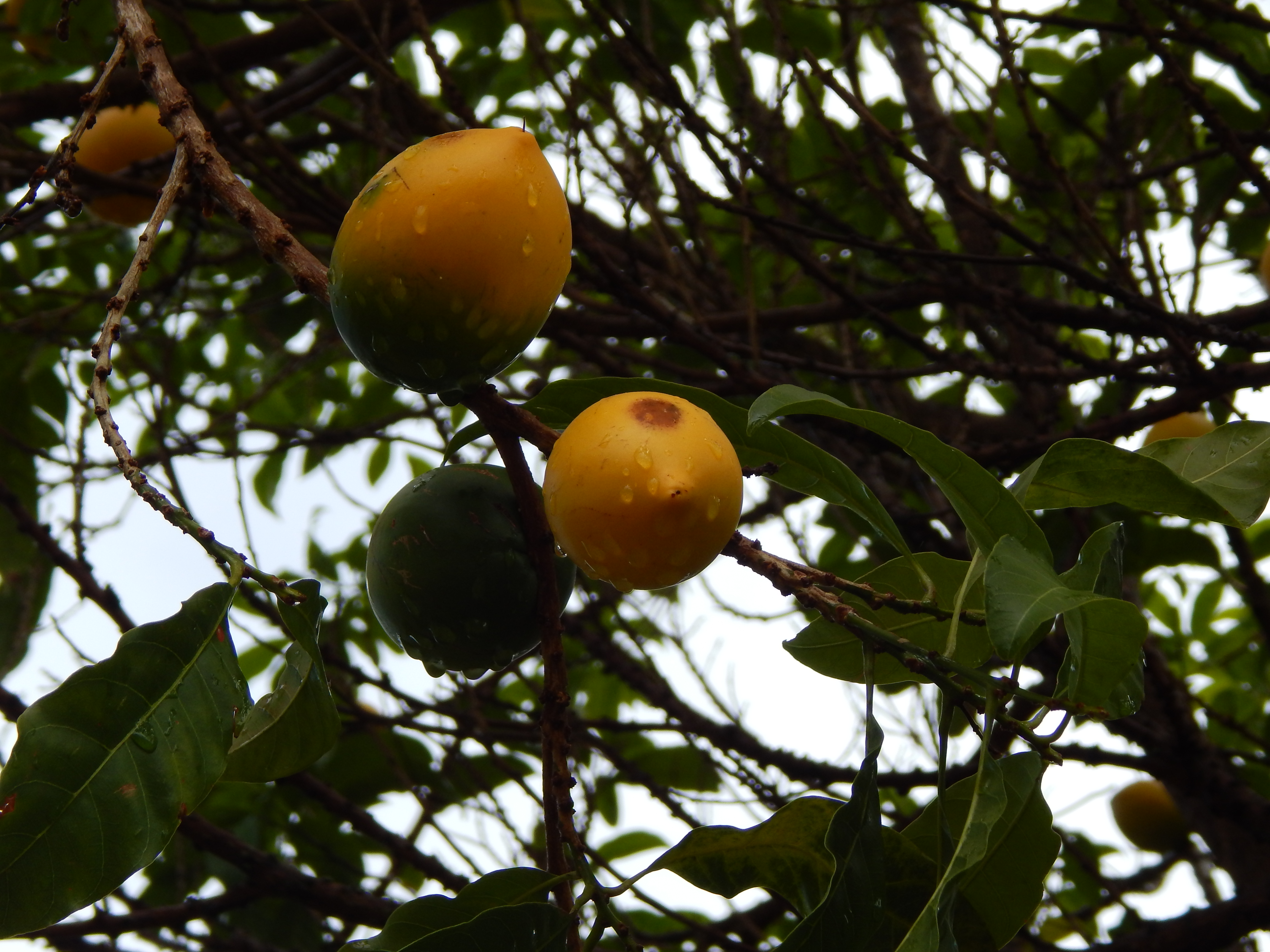 Pouteria caimito (Abiu fruit) Fruit at Pali o Waipio Huelo, Maui, Hawaii. September 25, 2014 #140925-2017 Image Use Policy